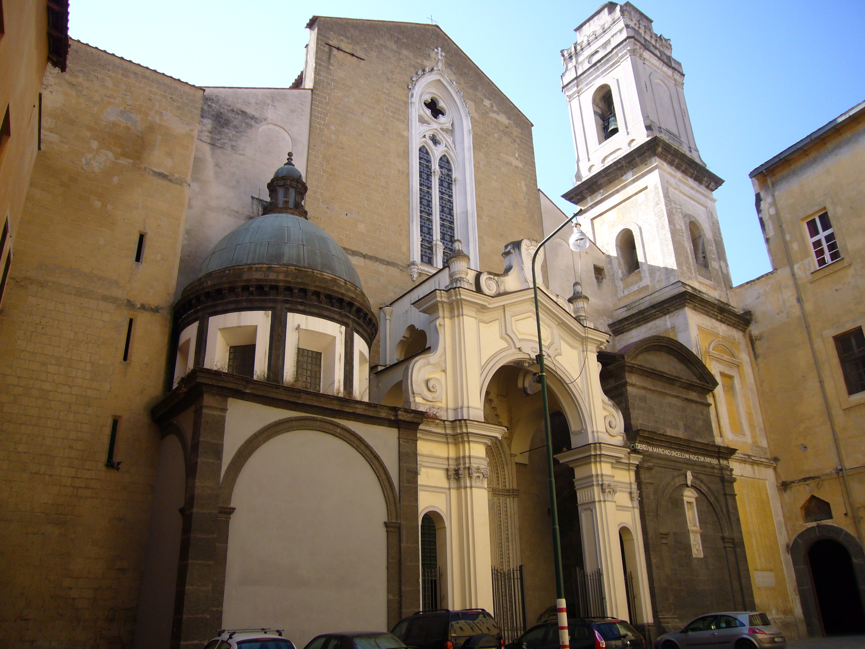 Napoli, san Domenico Maggiore: entrata